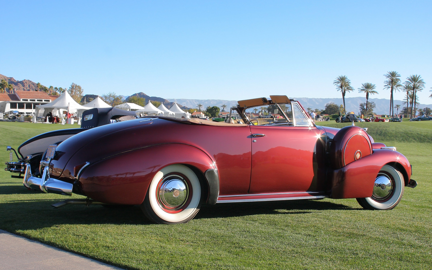 2011 Desert Classic, La Quinta, CA